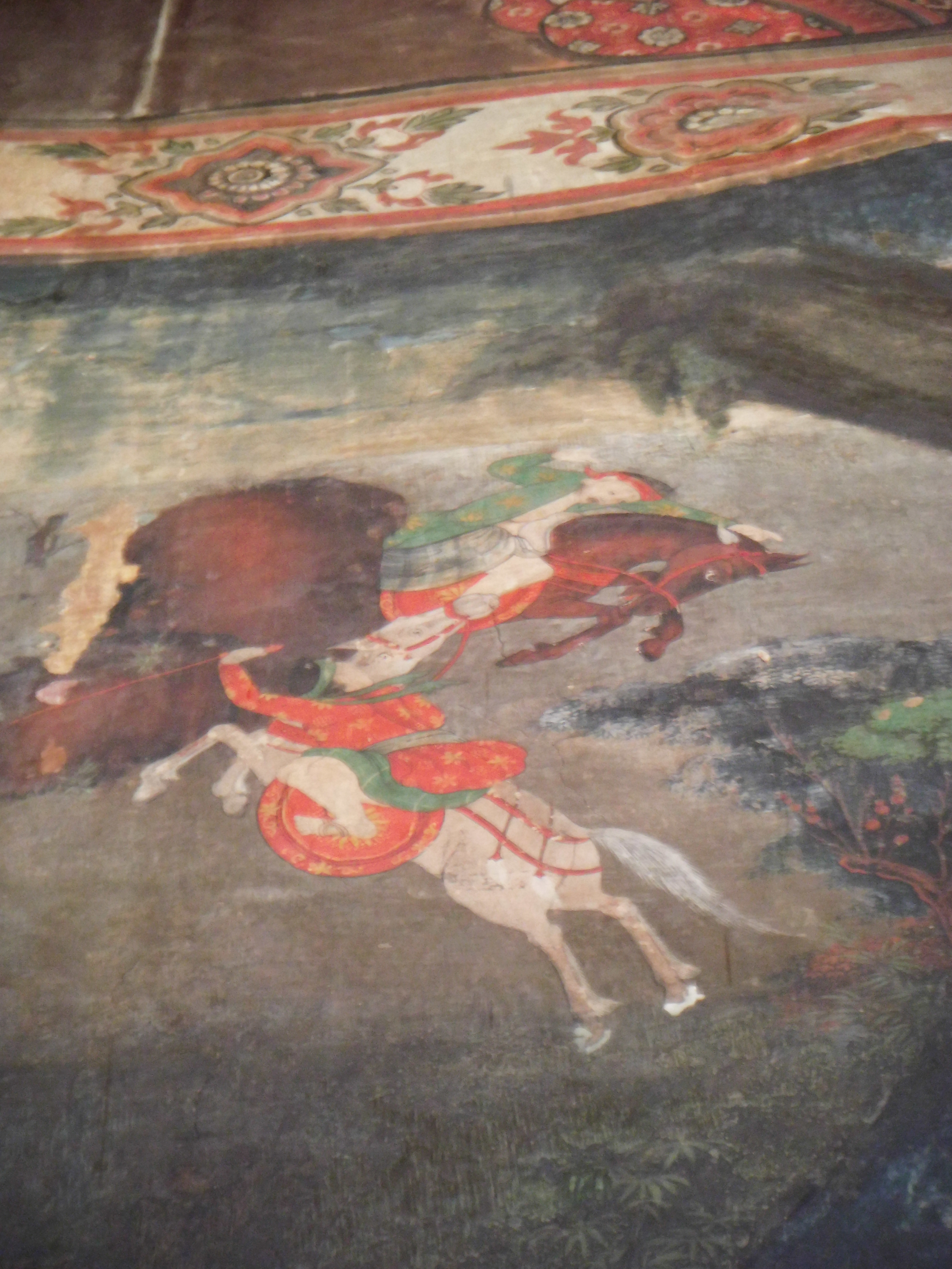 วัดสุวรรณาราม